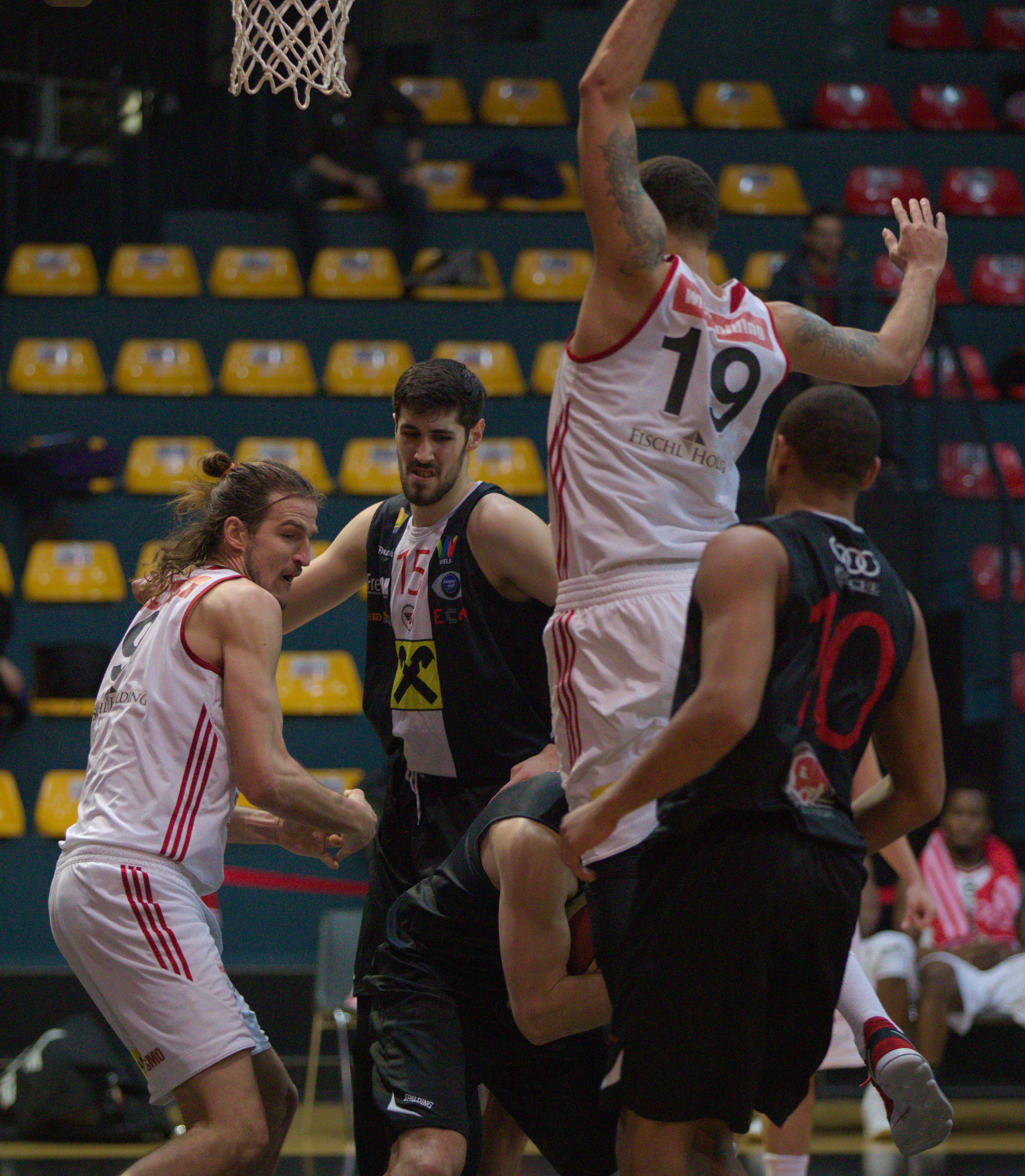 Basketball-Bundesligaspiel BC Hallmann Vienna vs. Raiffeisen Flyers Wels, 21. Jänner 2018